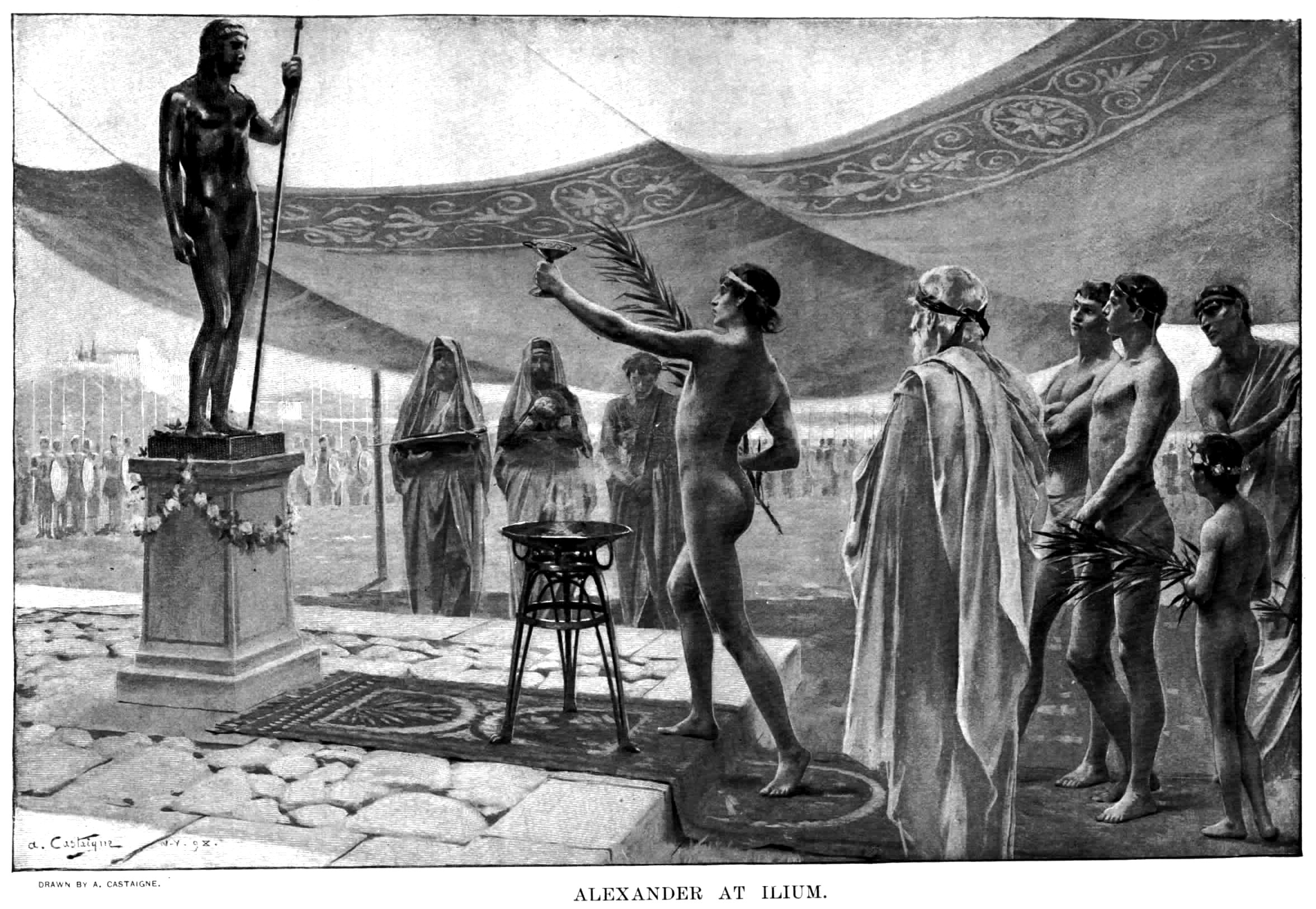 Alexander old drawings